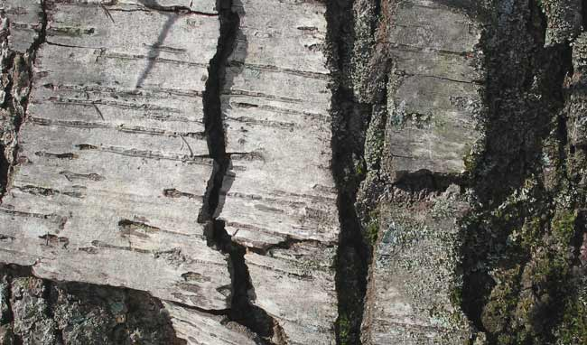 Black Birch bark.